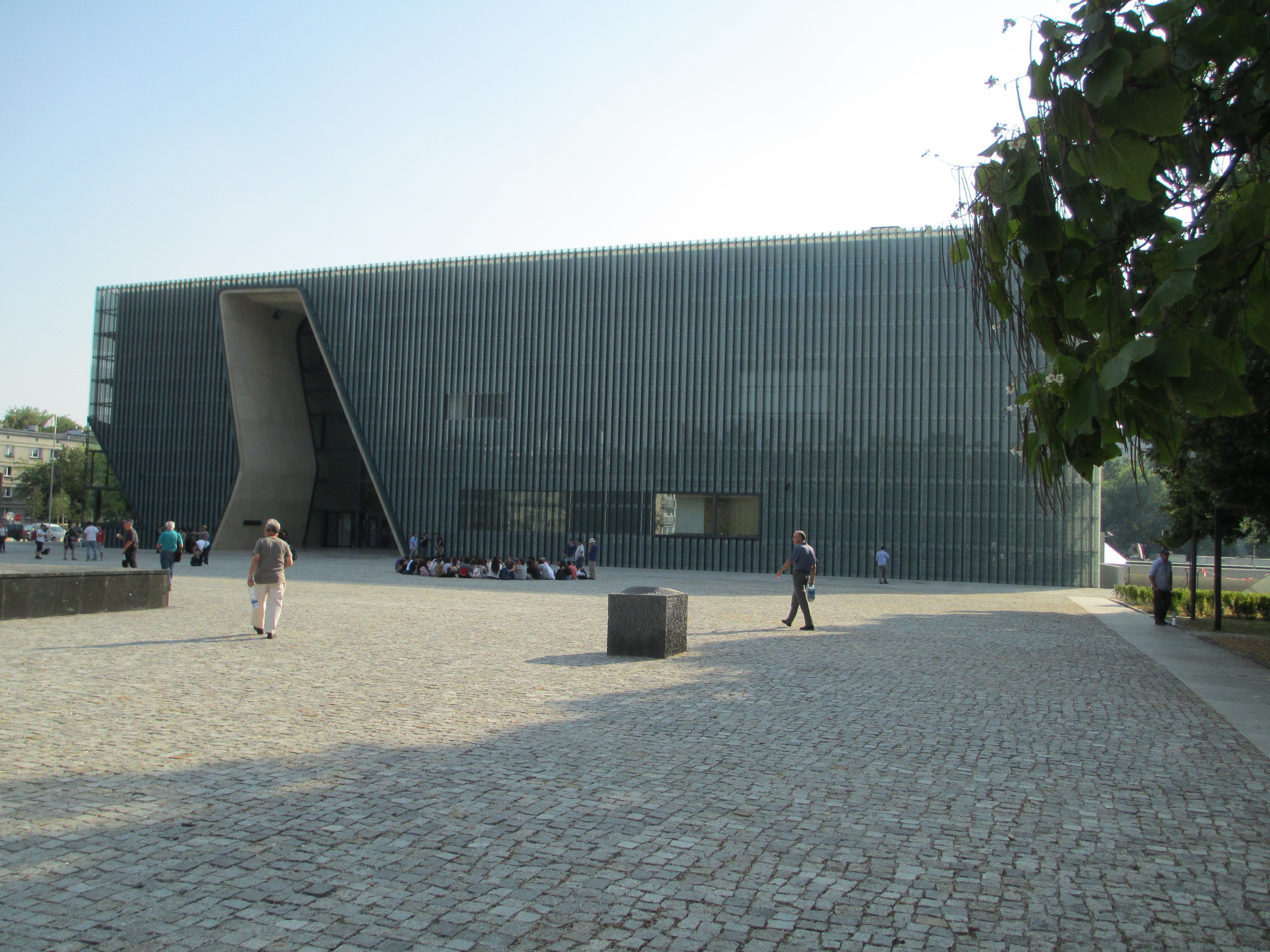 המוזיאון להיסטוריה של יהודי פולין בוורשה